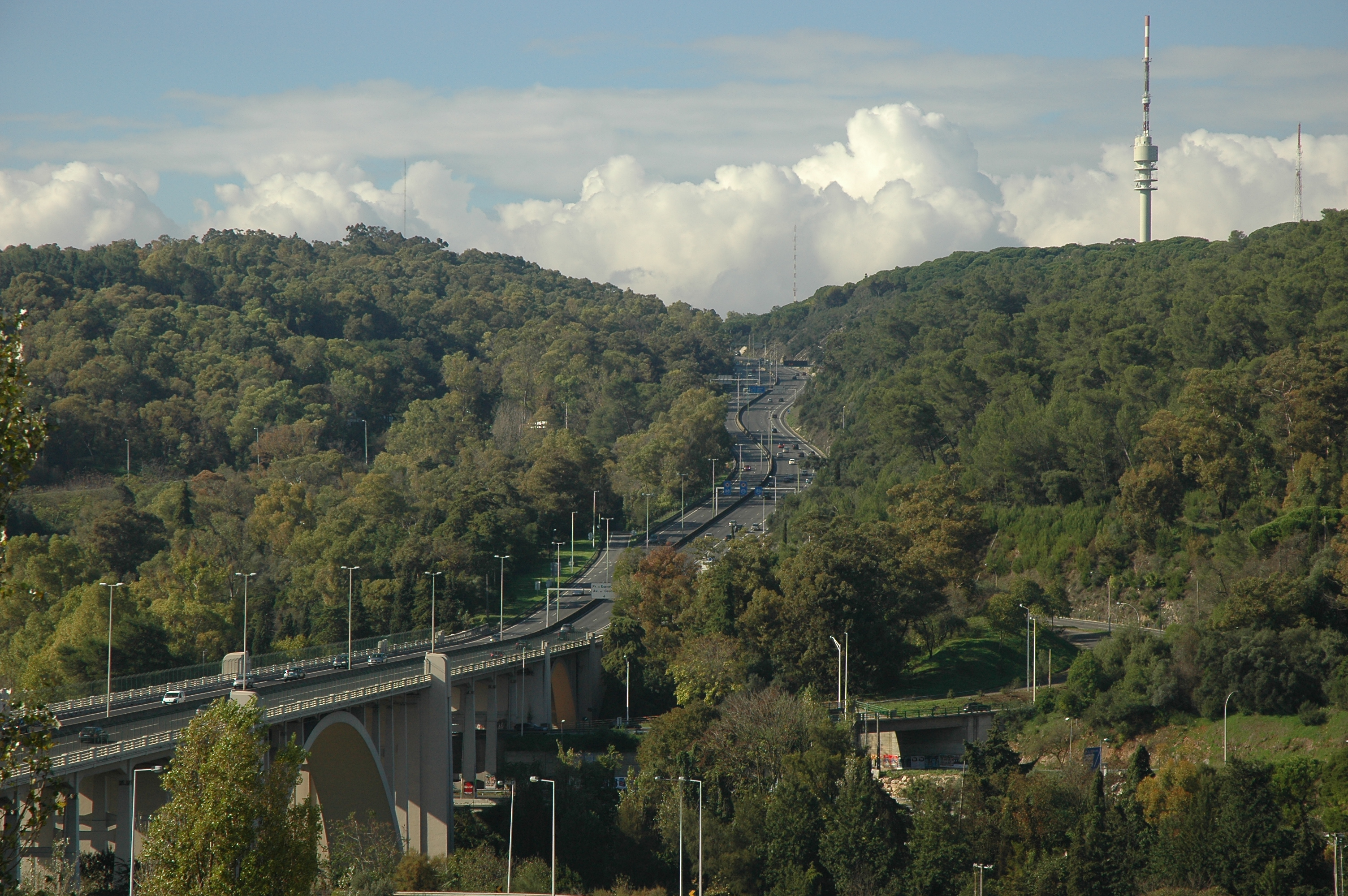 Vista do Parque Florestal de Monsanto a partir das Amoreiras, incluindo a A5 e o Viaduto Duarte Pacheco